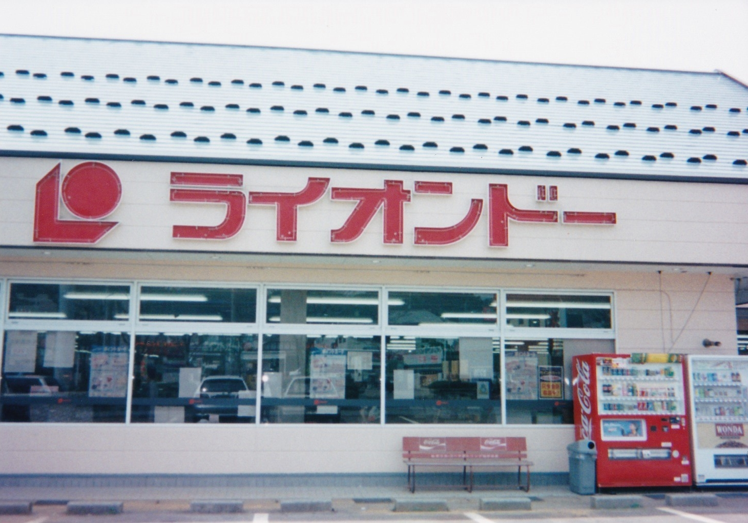 ライオンドー千石店外観2（2001年頃撮影）、フィルムカメラで撮影